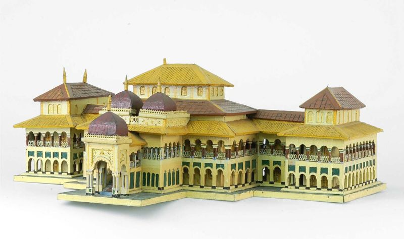 Huismodel. Het paleis is gelegen aan de Paleisweg.. Houten model van het paleis van de Sultan van Deli te Medan